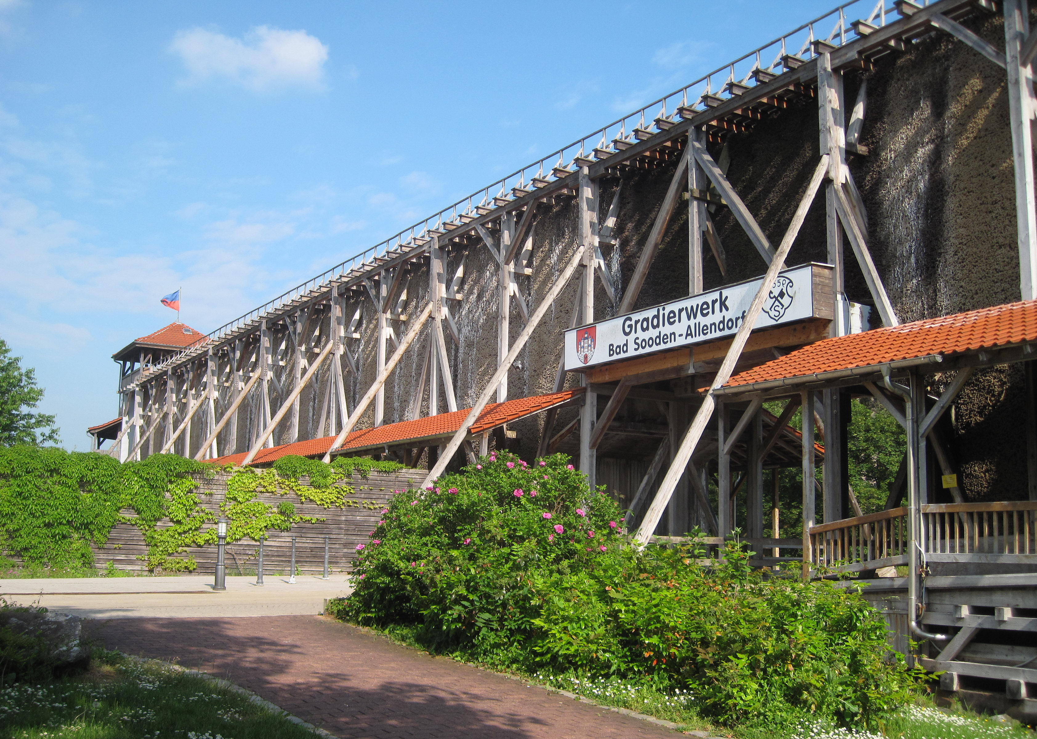 Gradierwerk in Bad Sooden-Allendorf, Ortsteil Bad Sooden.